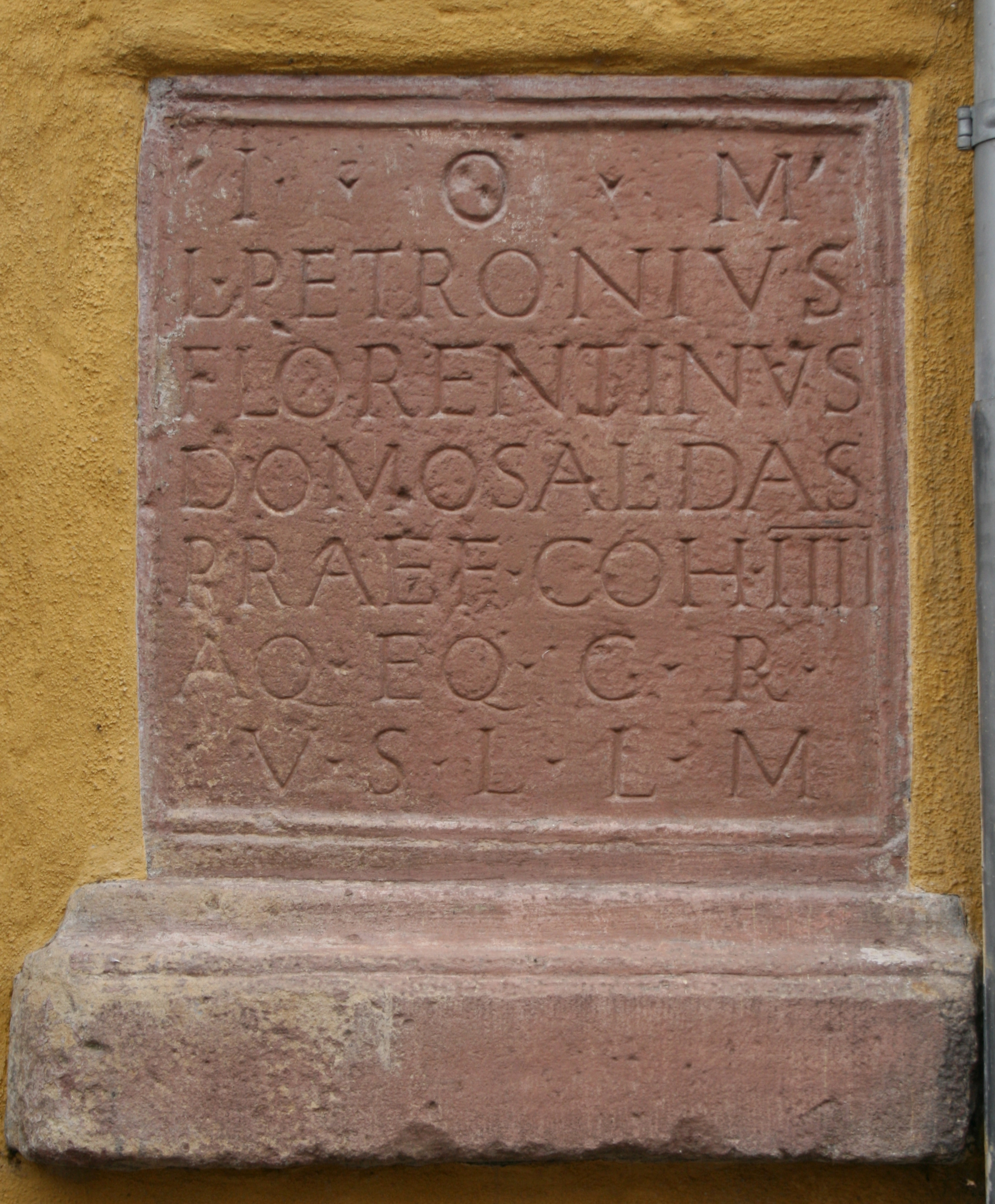 Römische Inschrift, in einem Haus in der Römerstraße in Obernburg am Main eingemauert. Geweiht von dem inschriftlich mehrfach erwähnten Praefekten Lucius Petronius Florentinus der im Kastell Obernburg nachgewiesenen Coh. IIII Aquitanorum eq. c.R. (CIL XIII, 06620).